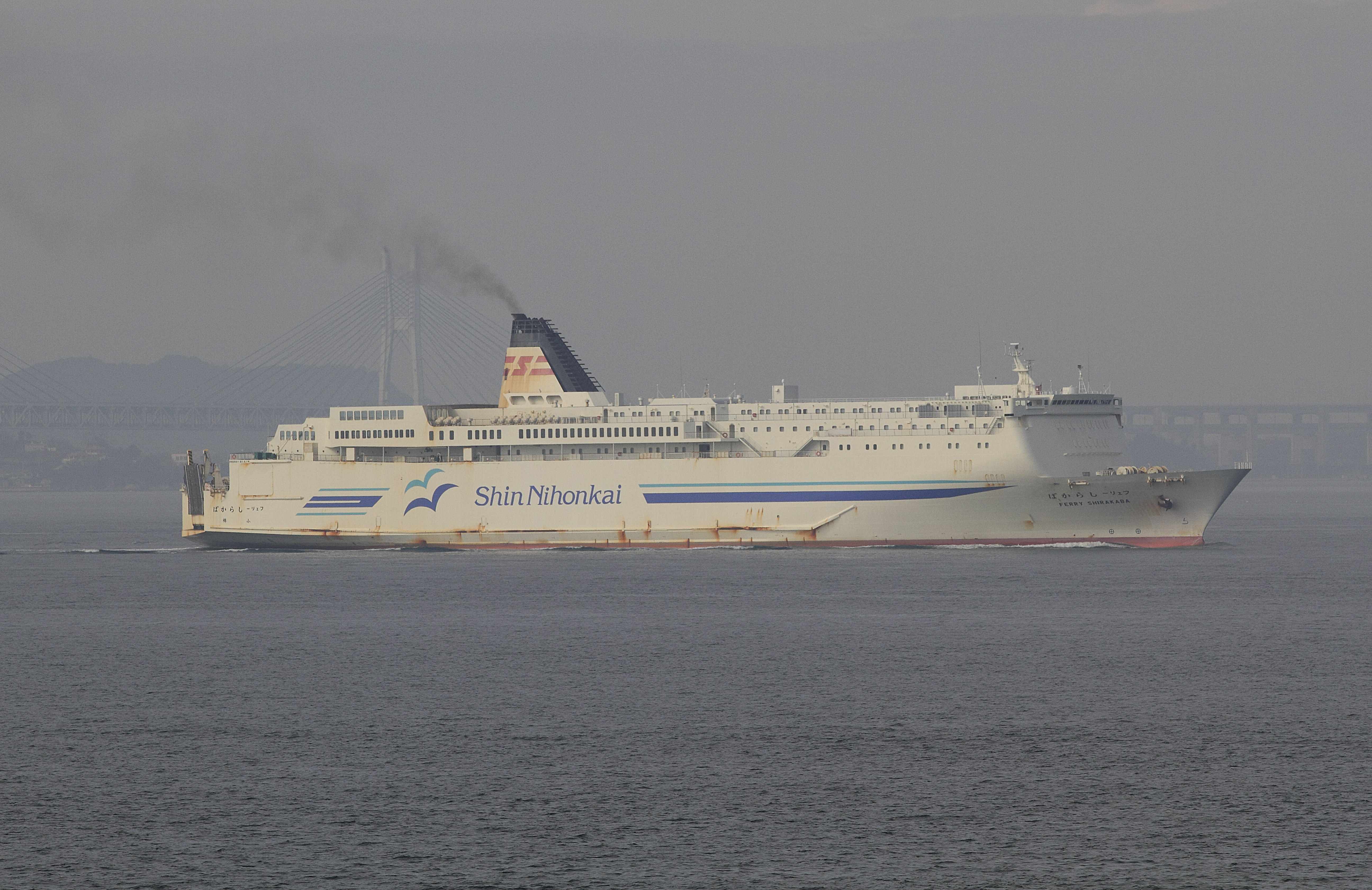 新日本海フェリー フェリーしらかば （瀬戸内海 坂出市沖）